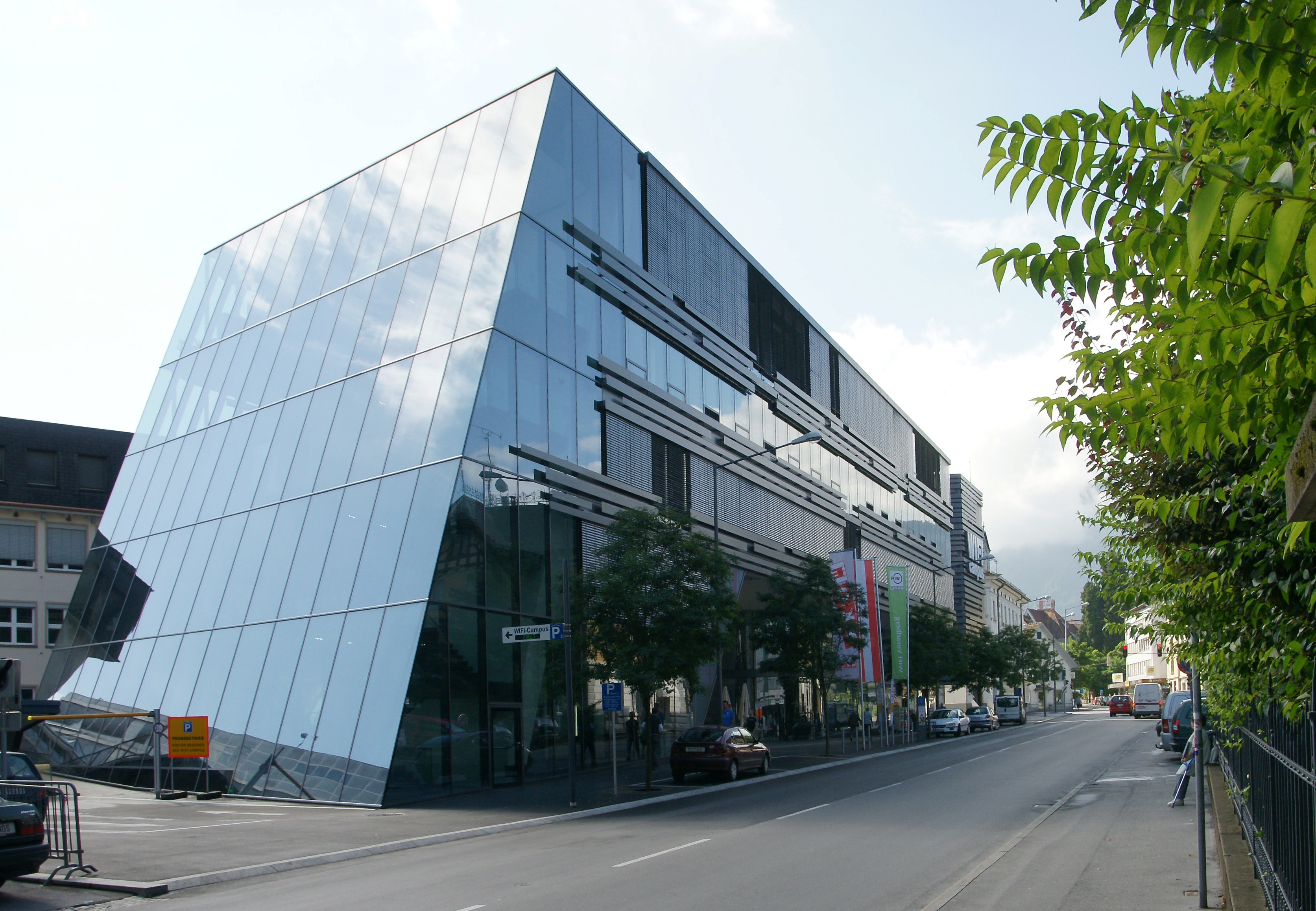 Das Wirtschaftsförderungsinstitut, abgekürzt WIFI, ist die größte berufliche Erwachsenenbildungsinstitution in Österreich. Im Bild der neue Campus in Dornbirns Bahnhofstraße 24. Geplant von der Wiener Gruppe Caramel architekten katherl . haller . aspetsberger [1]